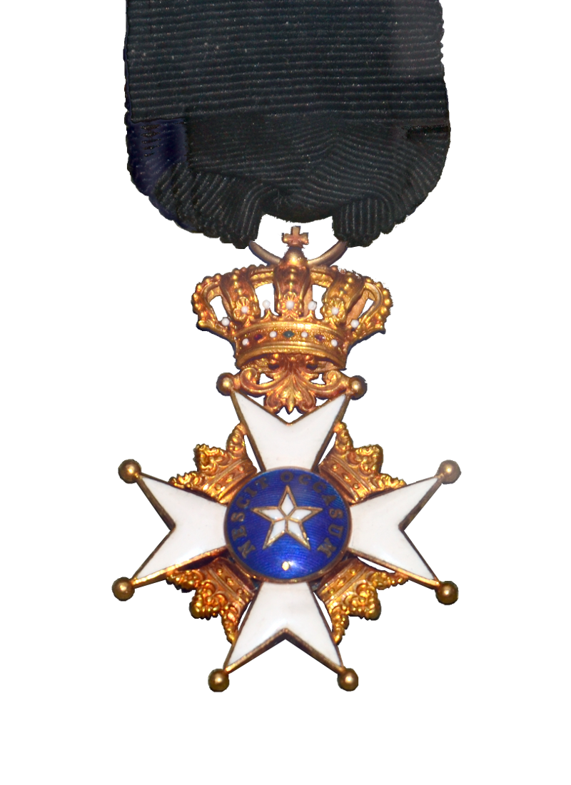 Nordstjärneorden